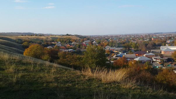 Аул Ходзь